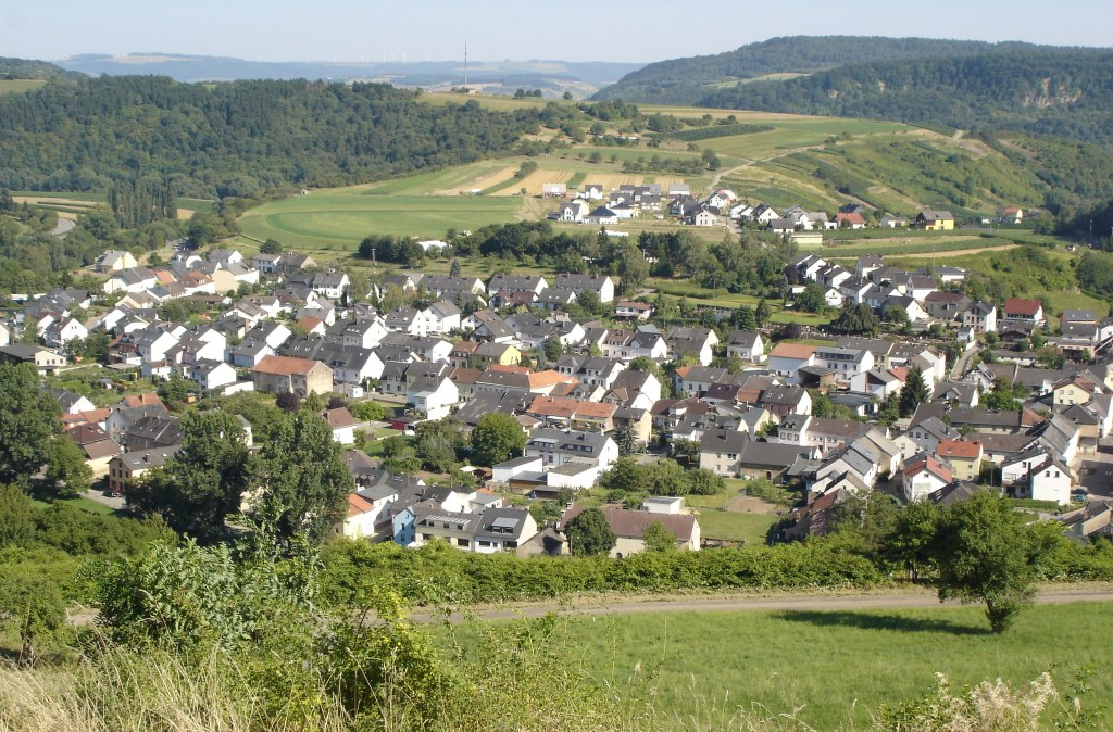 Blick auf Langsur von Grenz-Raststätte der A64 (Luxemburg)